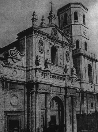 Fachada de la catedral de Valladolid anterior a 1923, cuando aún no se había instalado en la torre la escultura dedicada al Sagrado Corazón de Jesús.